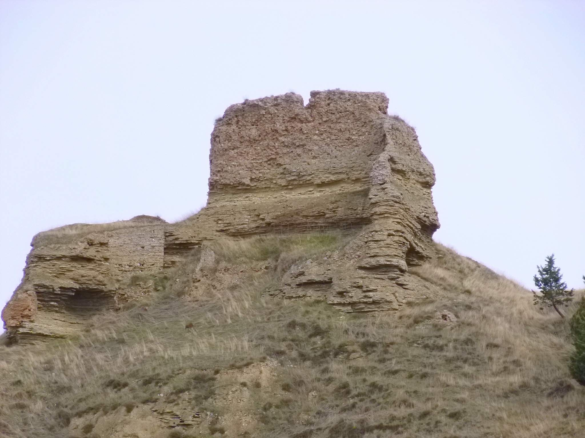 Pozůstatky středověkého hradu ve městě Belorado, Španělsko